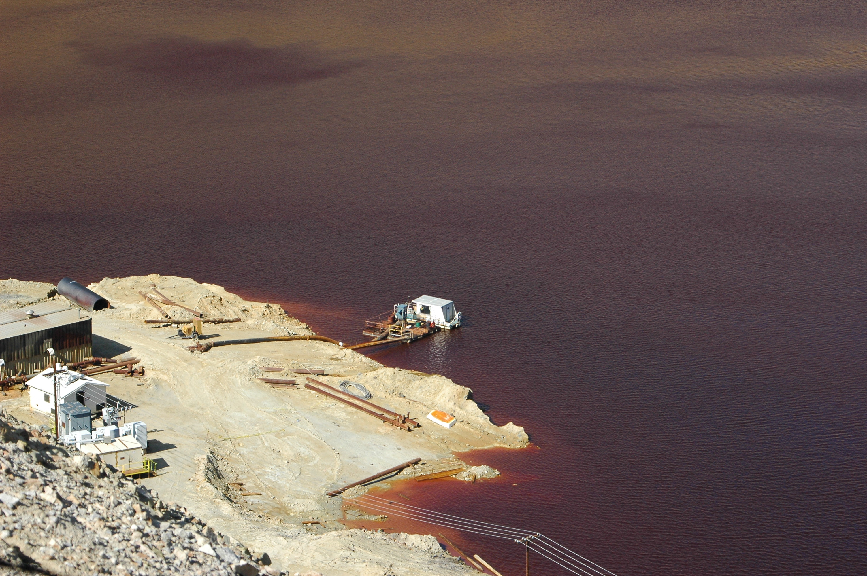 Berkely Pit, Butte, Montana